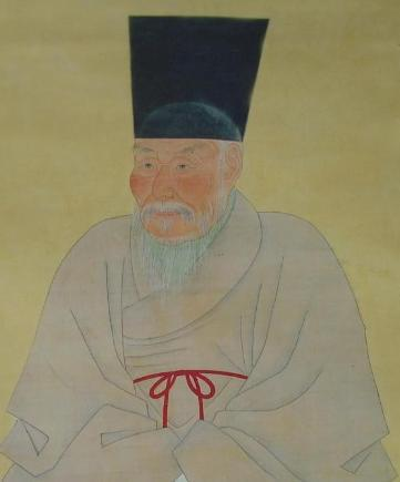 송곡 이서우, 조선 후기의 문신, 정치인, 시인, 서예가, 작가이며 남인 중진이었다. 1660년(현종 1년) 11월 11일 문과 증광시갑과(增廣試甲科)에 급제하여 정언, 예조참의, 동래부사, 홍예문제학(弘藝文學) 대사간(大司諫) 대사헌 부령부사 강릉부사 의주부윤 이조(吏曹) 호조(戶曹) 형조(刑曹) 공조(工曹)의 참판, 오위도총부 부총관(五衛都總府副總管)을 지냈고 방백으로는 경기, 황해, 경상, 강원, 함경 오도백(五道伯)을 역임 하였으며 강릉 부령 동래부사로 재직 중 선정을 베푸렁 인정비(仁政碑)가 세워져있다. 특히 시문과 서도(글씨)에 유명하며 문수사 풍담대사비, 강릉 이의배 신도비, 노주 김태일 묘갈명, 오리 이원익 묘갈명, 오리집 서문 등을 찬하였다.